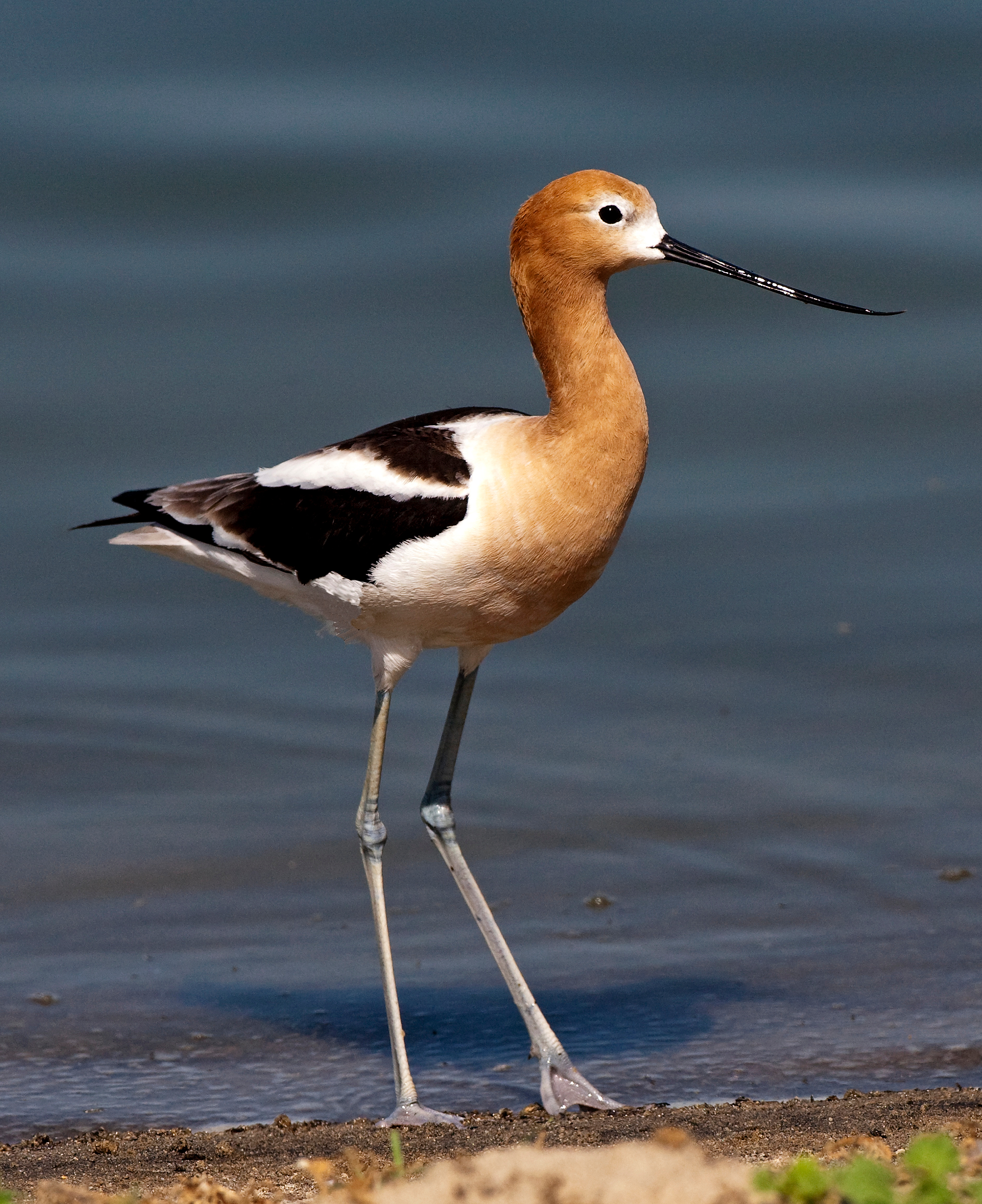 Recurvirostra americana, Morro Bay, California